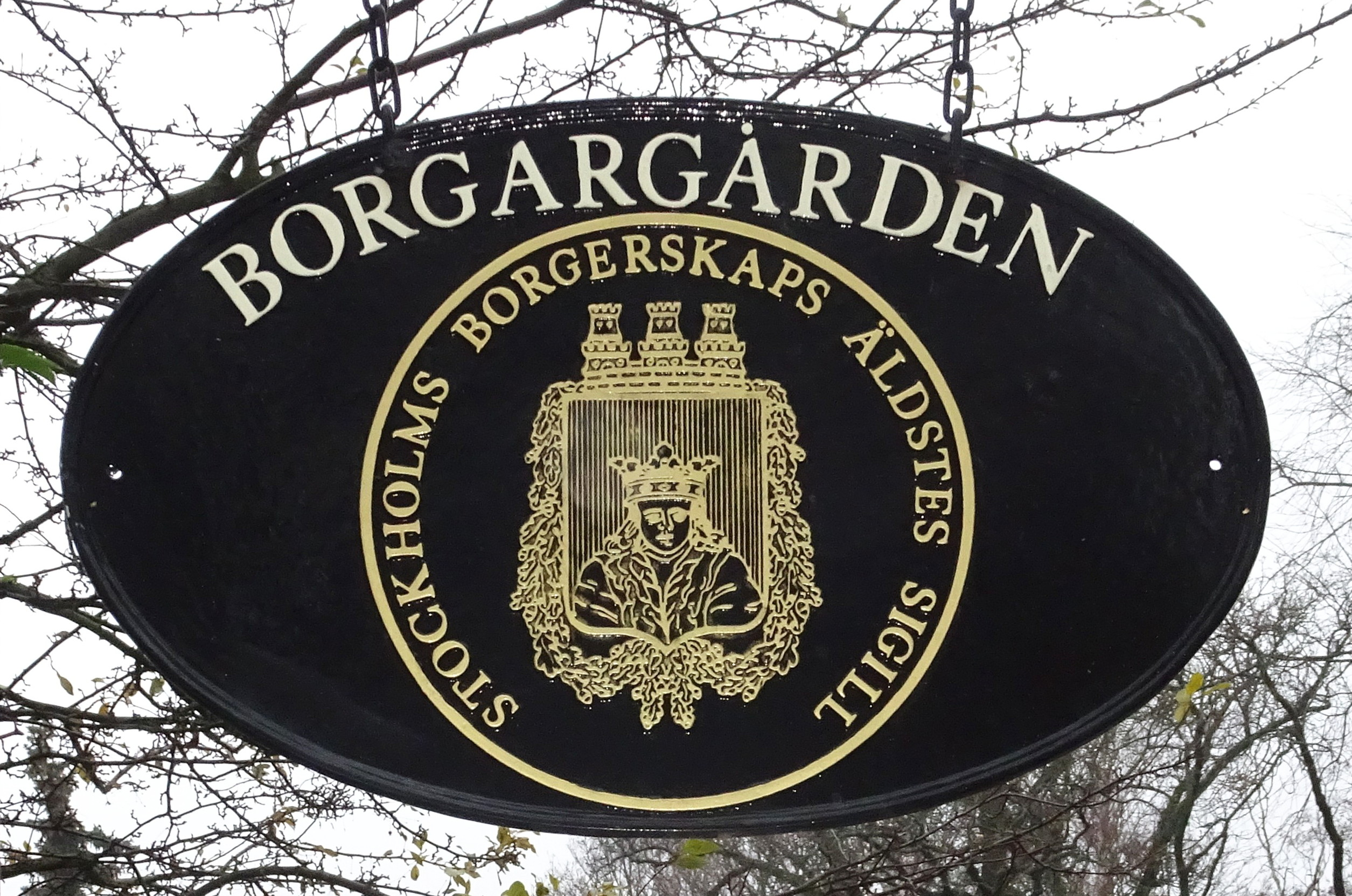 Borgargårdens skylt vid Borgargården Rålambsvägen 66